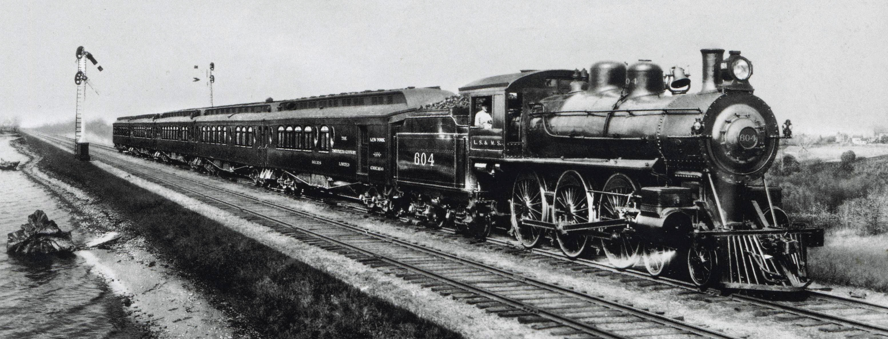 Sujet:20 Cent Lok Source:Archiv Les Meloures